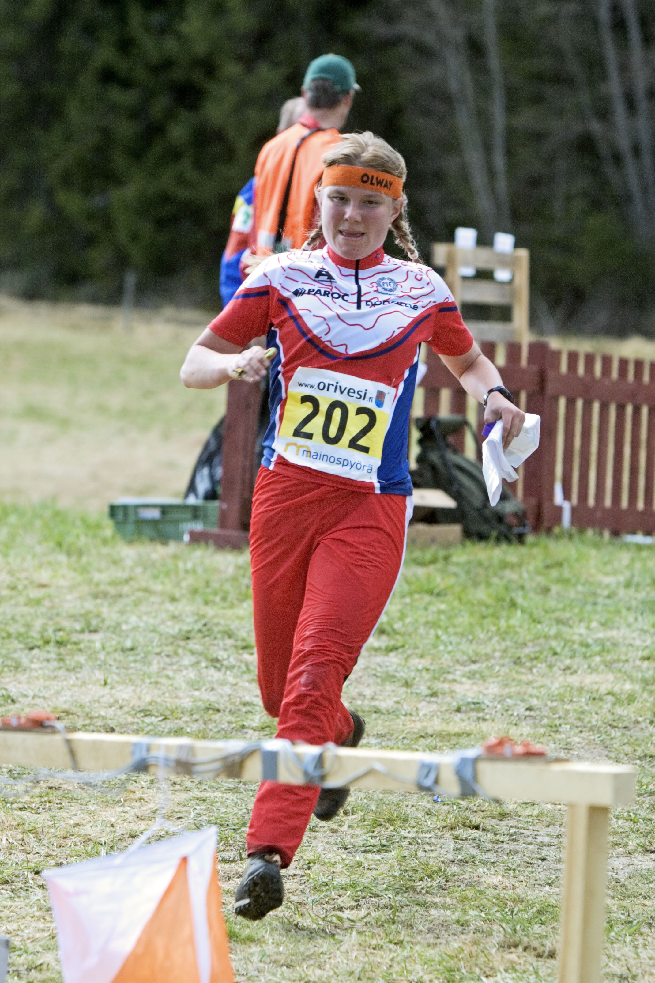 Orienteering in Finland